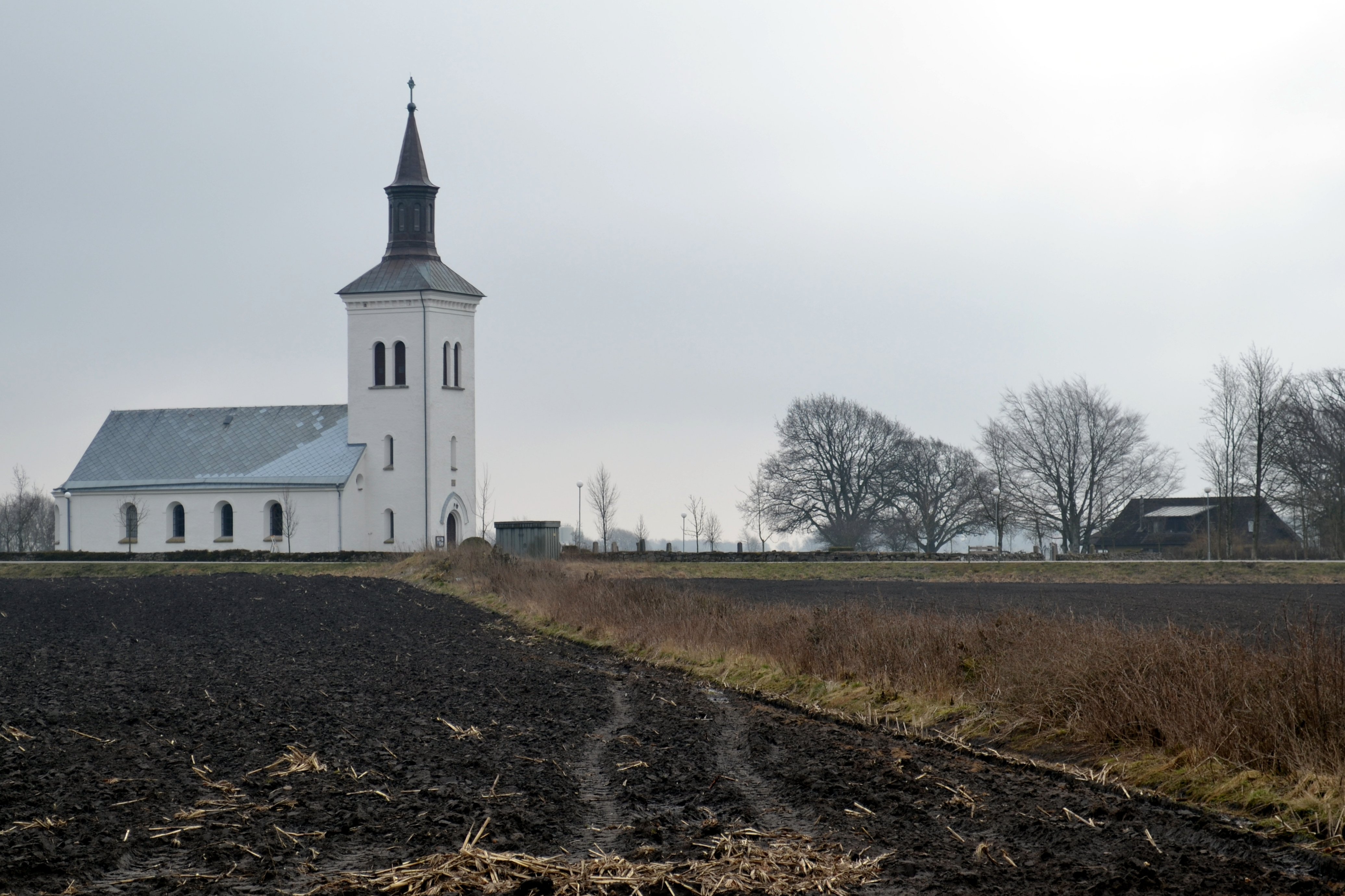 Hunnestads kyrka, Halland.